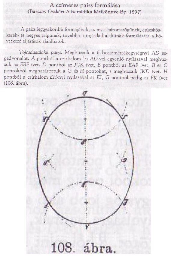 Az ovális pajzs szerkesztése